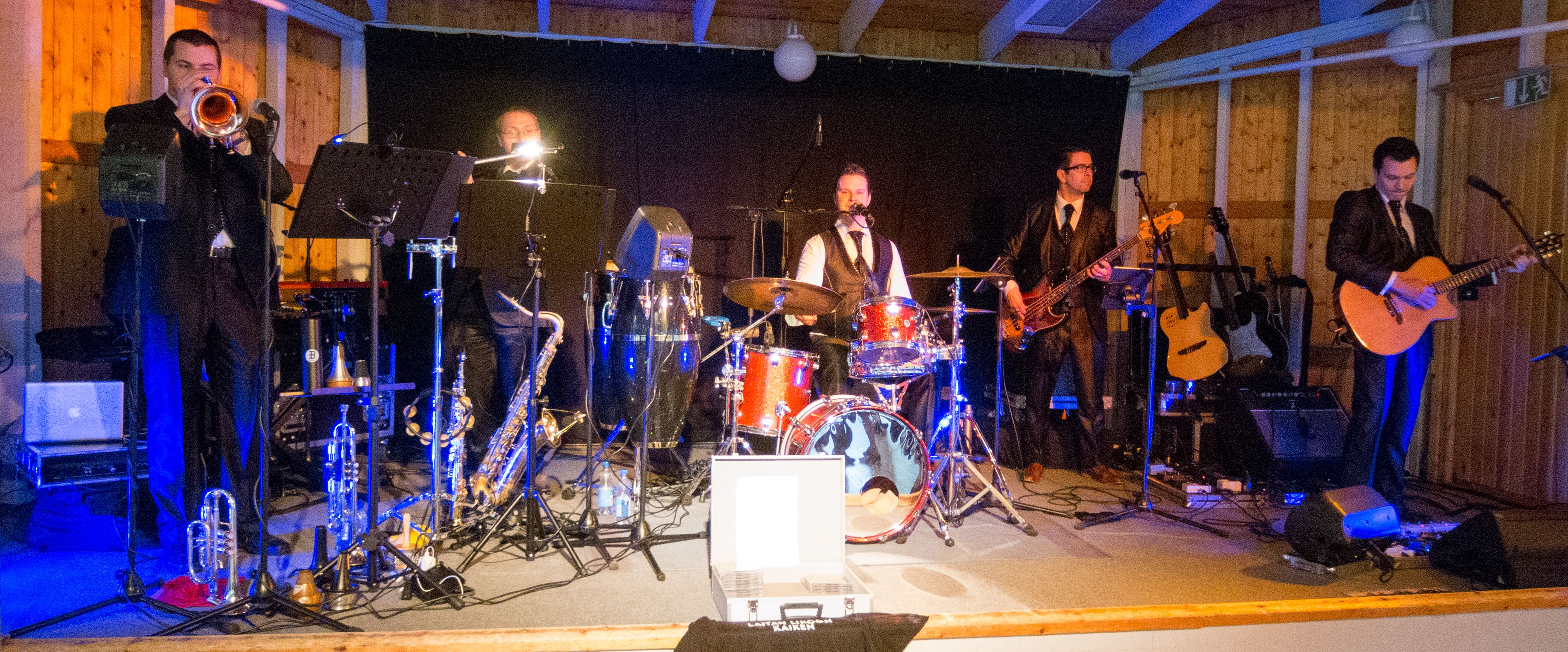 Sinitaivas suomalainen tanssiorkesteri